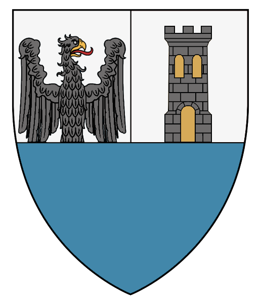 Stema Crișanei concepută digital după o reprezentare din colecția familiei Flondor, sec. XIX.